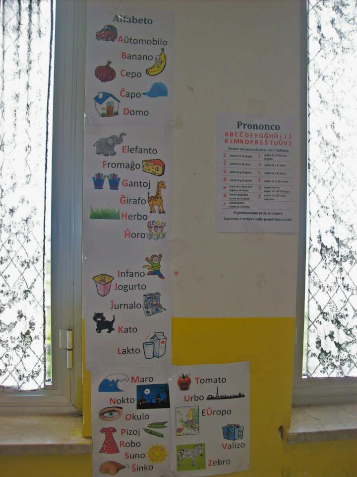 Esperanto-afiŝo en bazlernejo de Mazara del Vallo